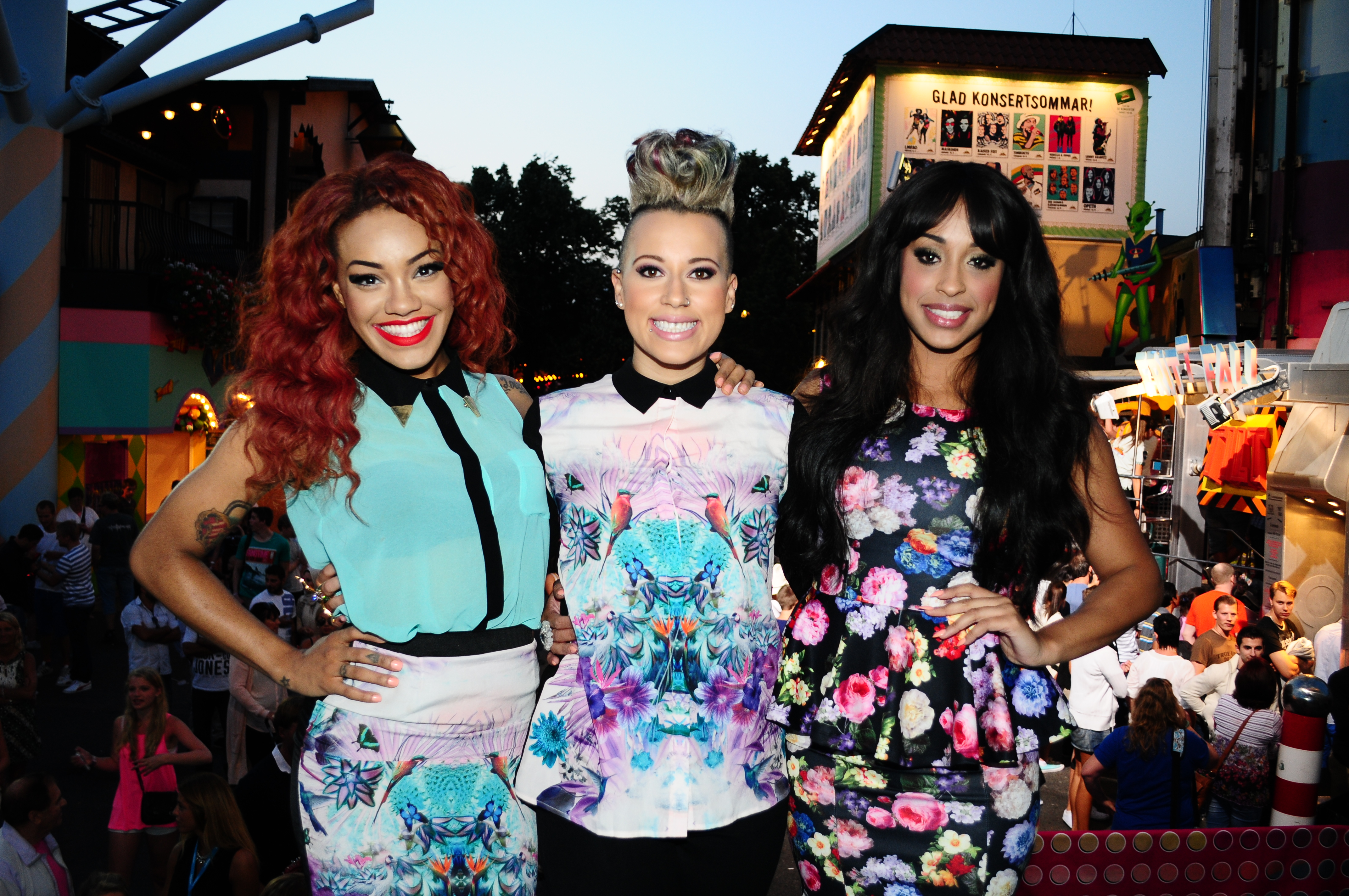 Stooshe visit a show named Sommarkrysset (Summercross) 2012